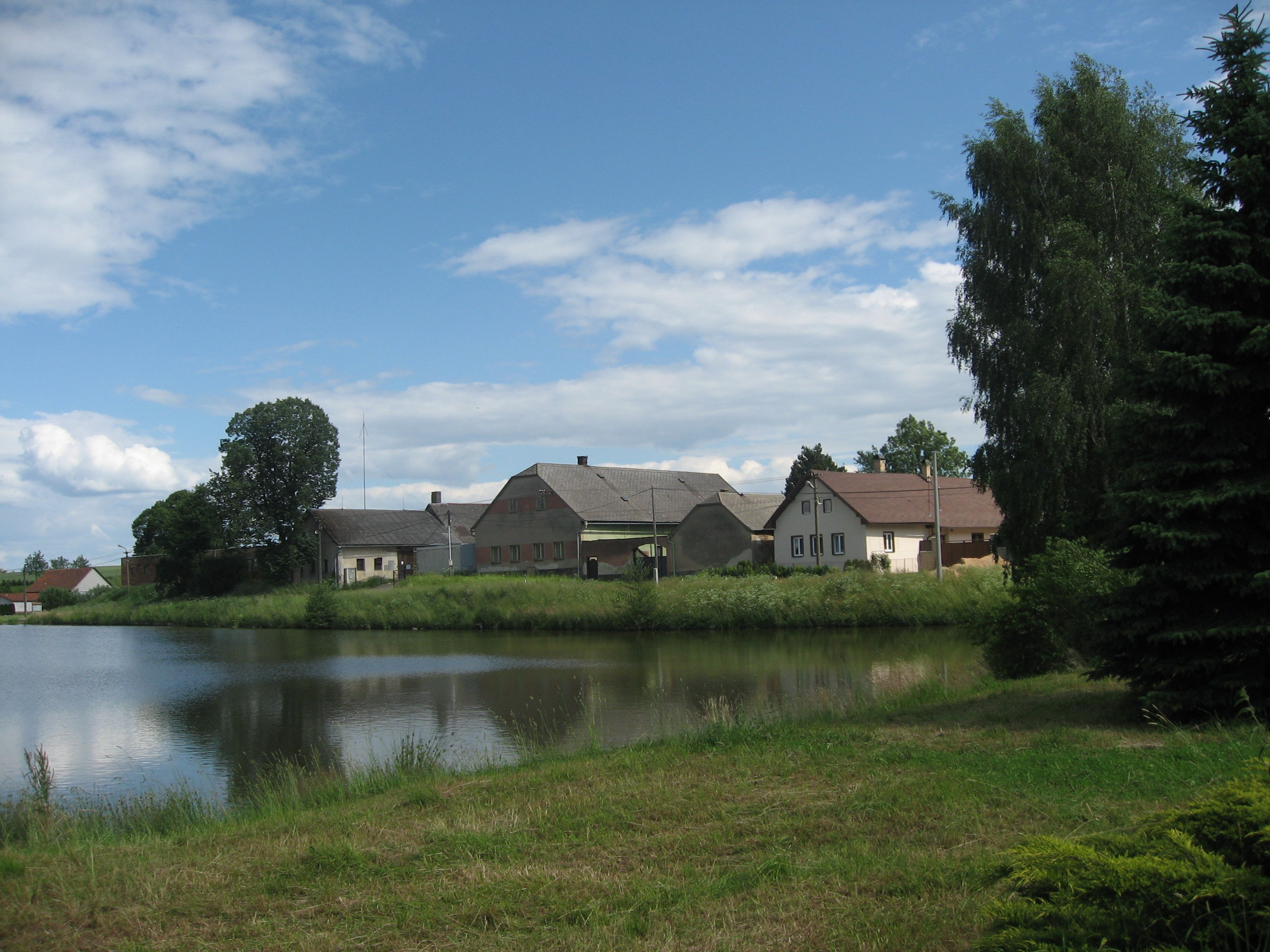 Pozovice. Horní pozovický rybník.Osad Pozovice část obce Štoky.Okr. Havlíčkův Brod. Kraj Vysočina. Czech Republic.